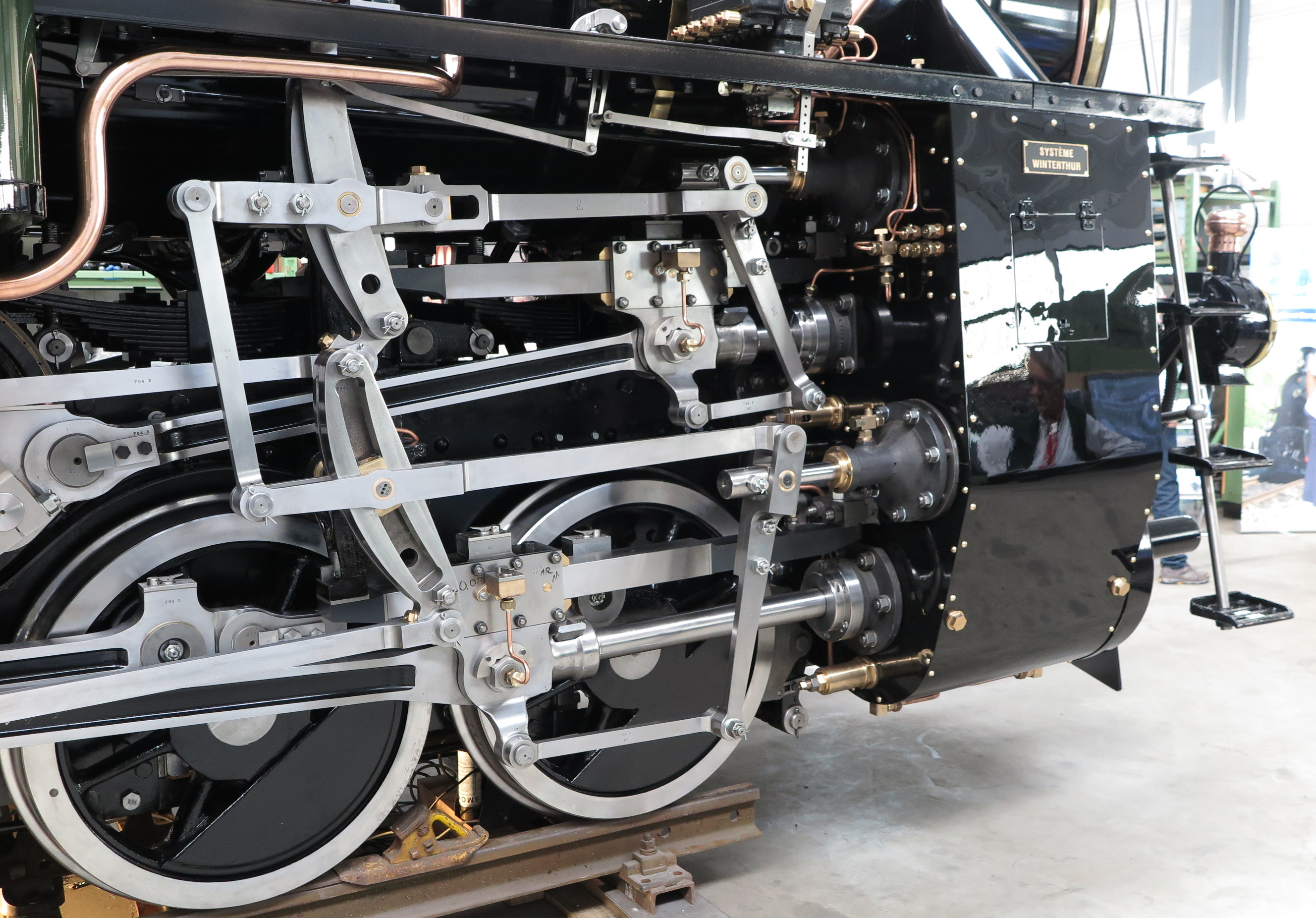 Lok 704 in Uzwil, Blick auf die rechte Antriebsseite mit Niederdruckzylinder (oben, Zahnrad antrieb) und Hochdruckzylinder (unten, Adhäsionsantrieb